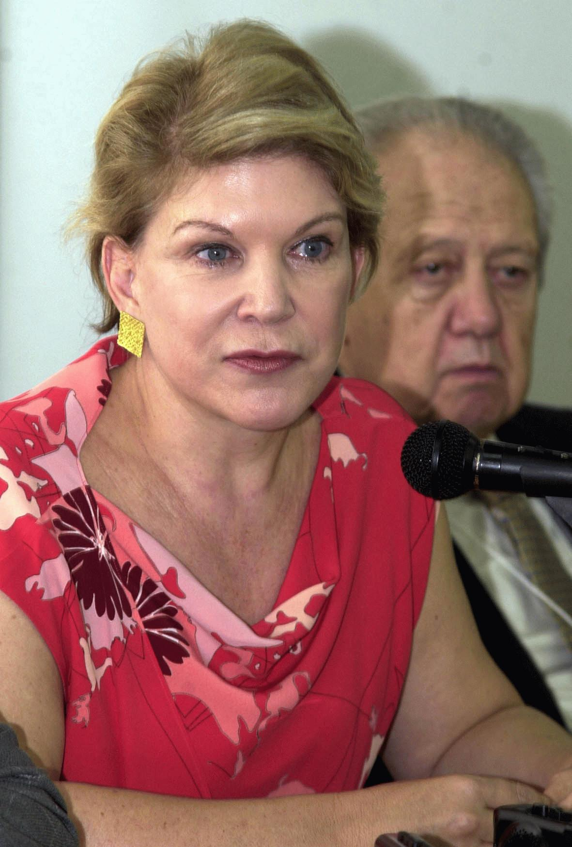 Porto Alegre, 22 de janeiro de 2003, a prefeita de São Paulo, Marta Suplicy, em entrevista ao lado do ex-presidente de Portugal Mário Soares.